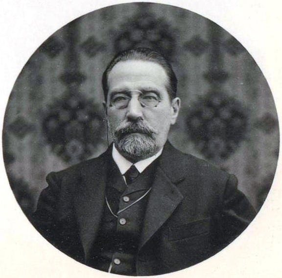 Шервинский, Василий Дмитриевич